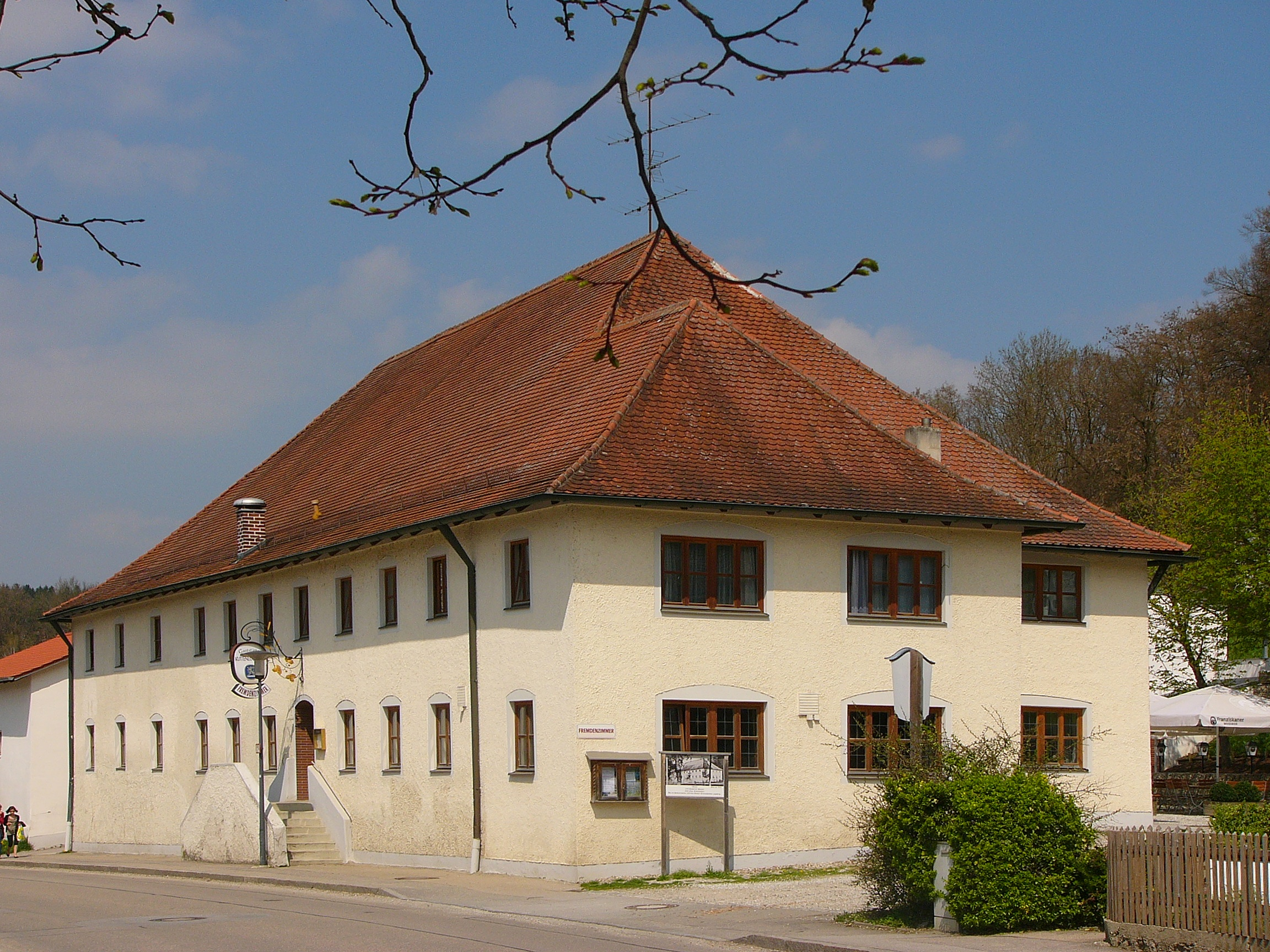 Gasthaus; zweigeschossiger Walmdachbau mit Vortreppe und Aufzugsgiebel, wohl noch 18. Jahrhundert.This is a photograph of an architectural monument.